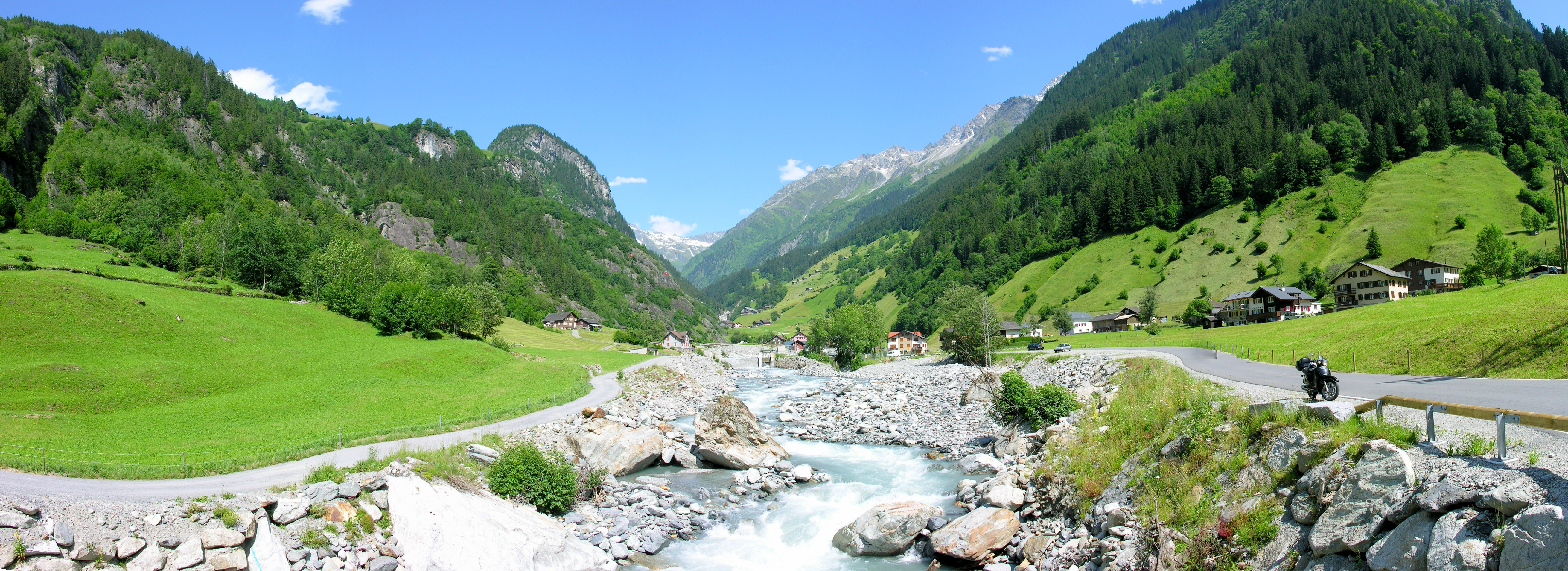 Switzerland, Uri, Bristen